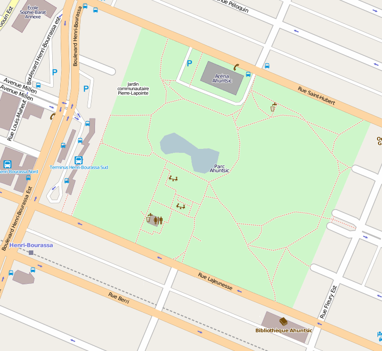 Carte du parc Ahuntsic, à Montréal